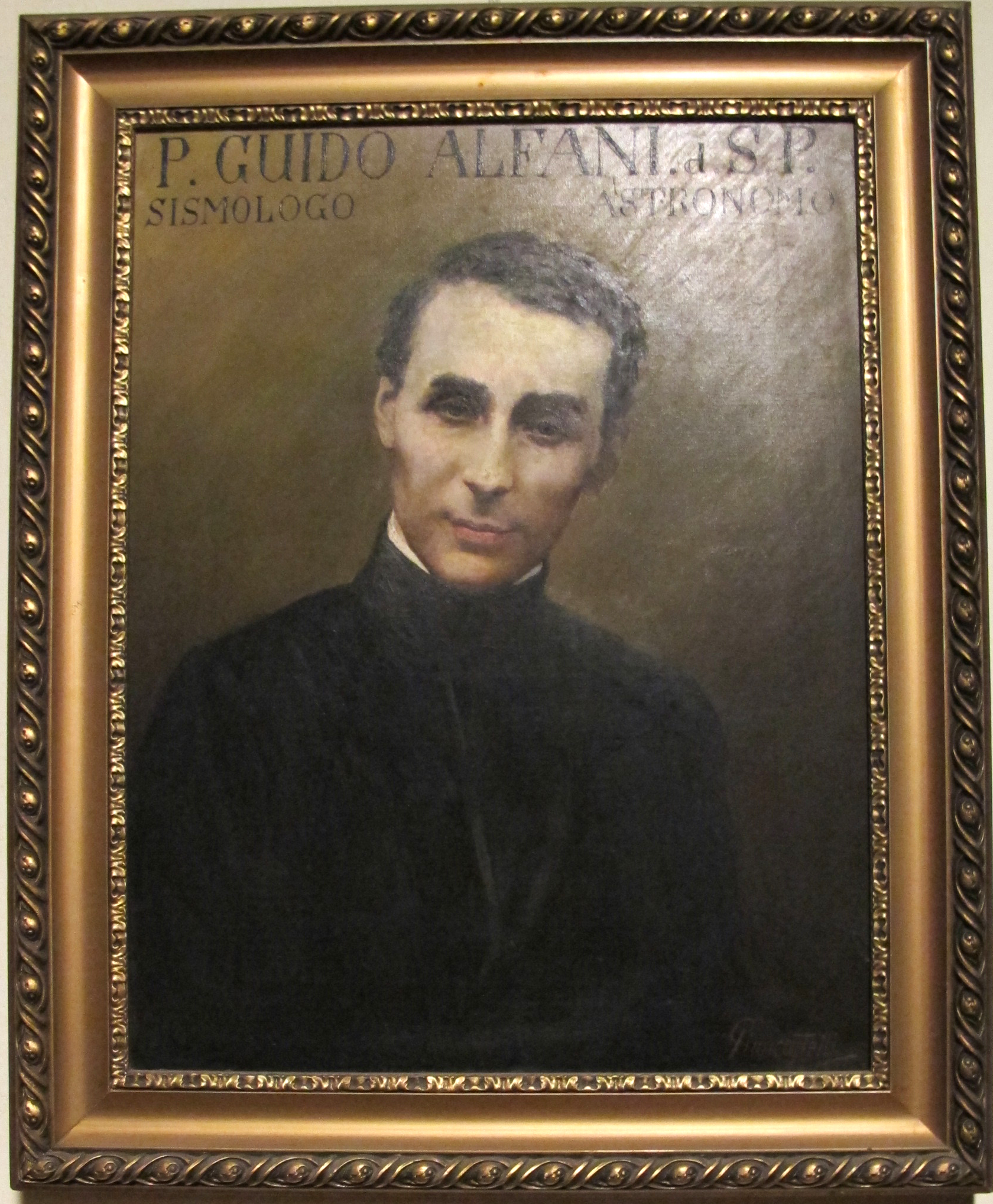 Osservatorio ximeniano, padre guido alfani